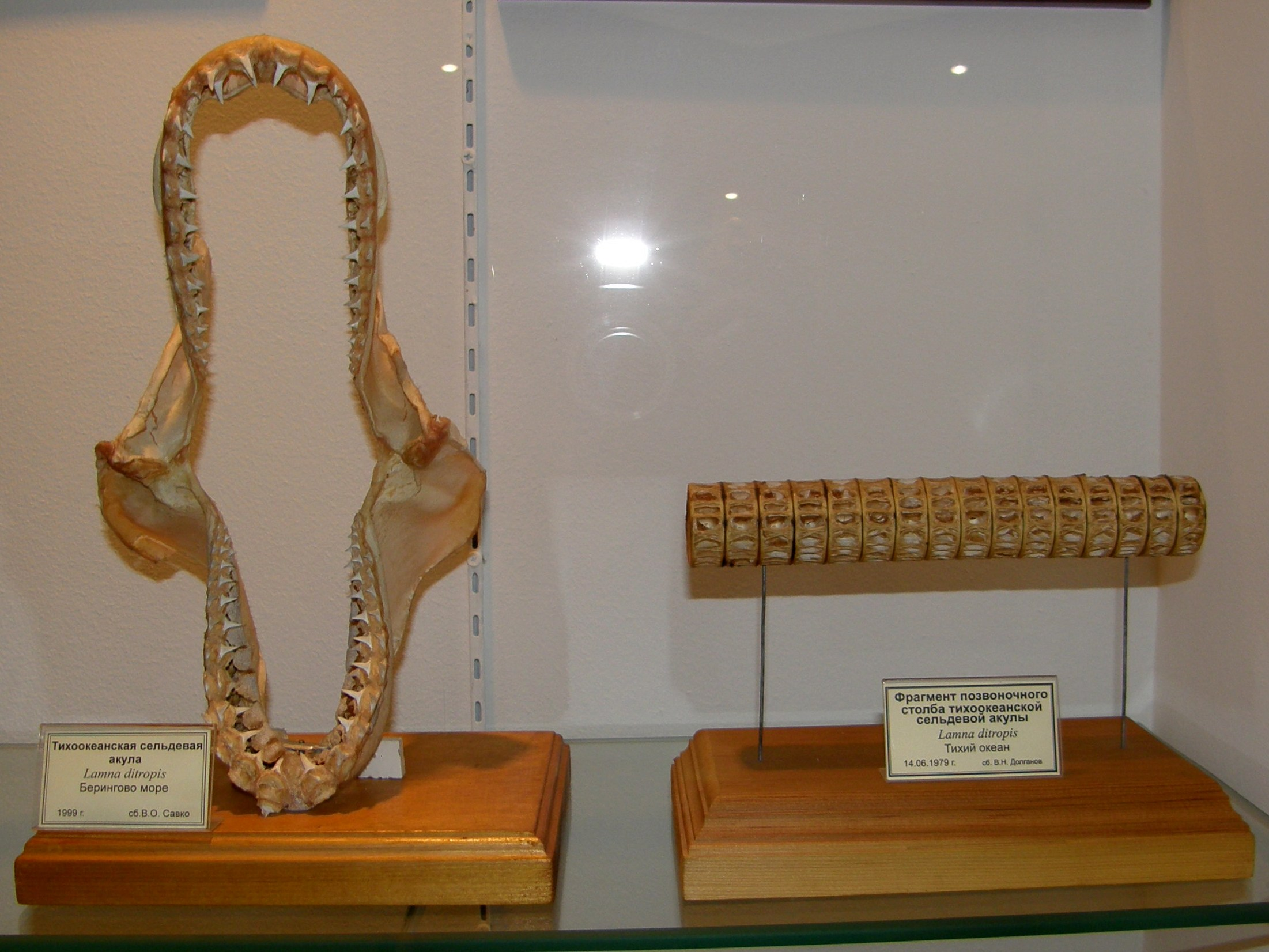 Челюсти и фрагмент позвоночника тихоокеанской сельдевой акулы (Lamna ditropis) в Научном музее ДВФУ (г. Владивосток)